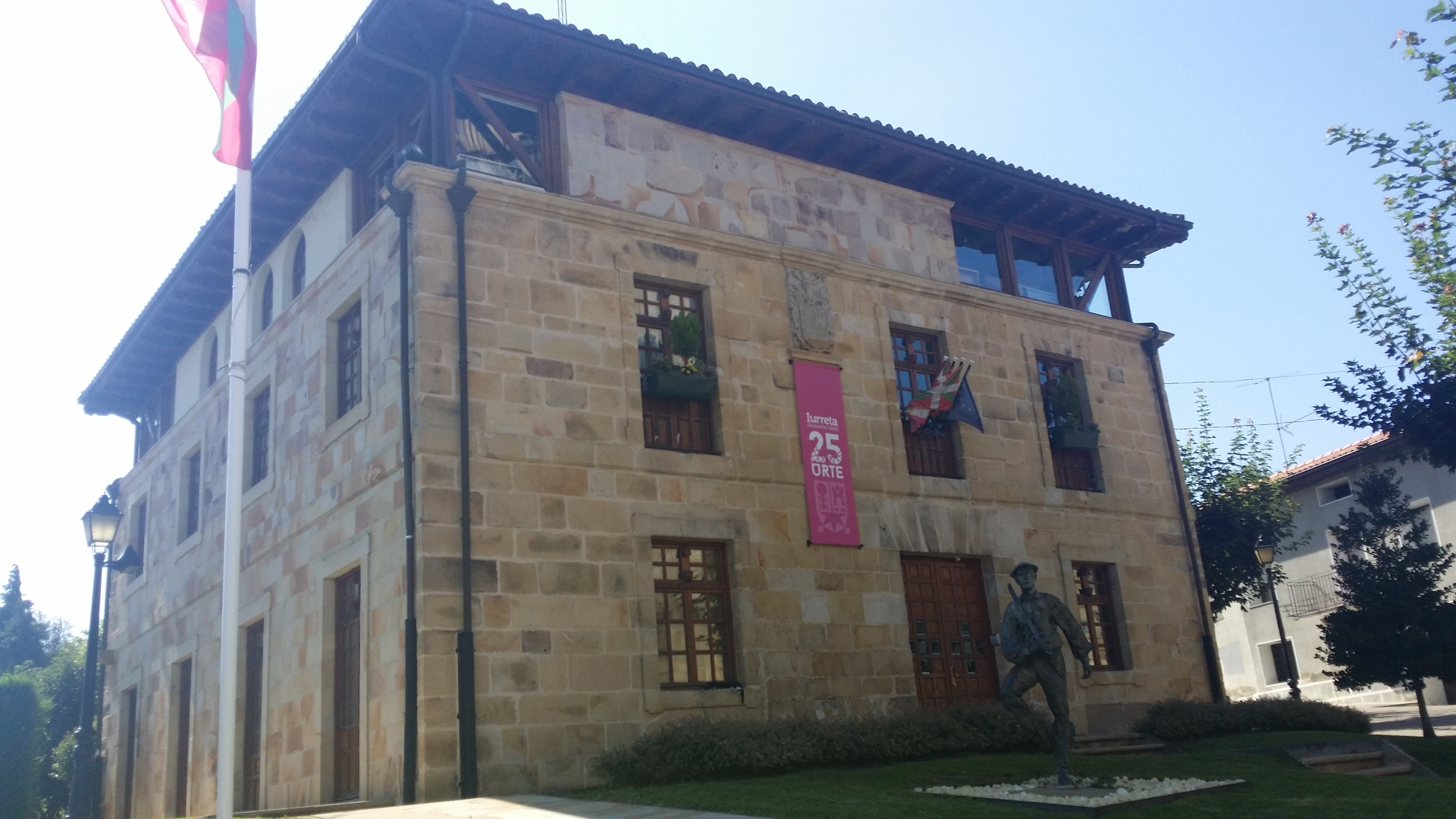 Iurretako Udaletxea